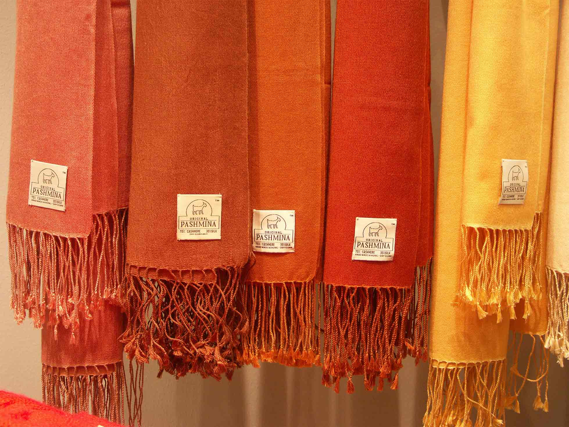 Sogenannte Pashmina-Schals/ Scarf: Gewebe aus 70% Kaschmirwolle/ Cashmere and 30% Seide/ silk; House of Pashmina, Hamburg; own Photography, 05-01-2006